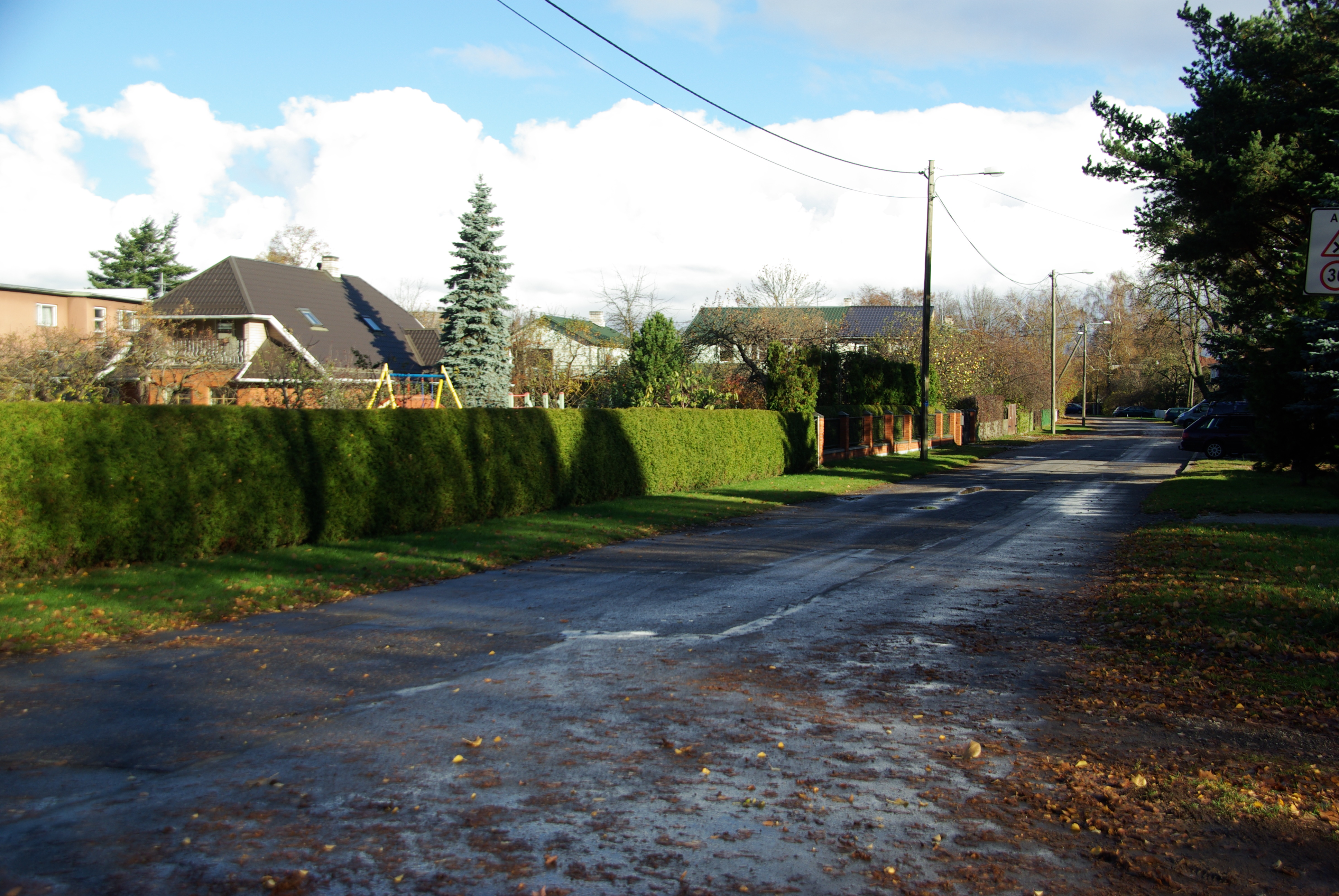 tänav Tartus Tammelinnas